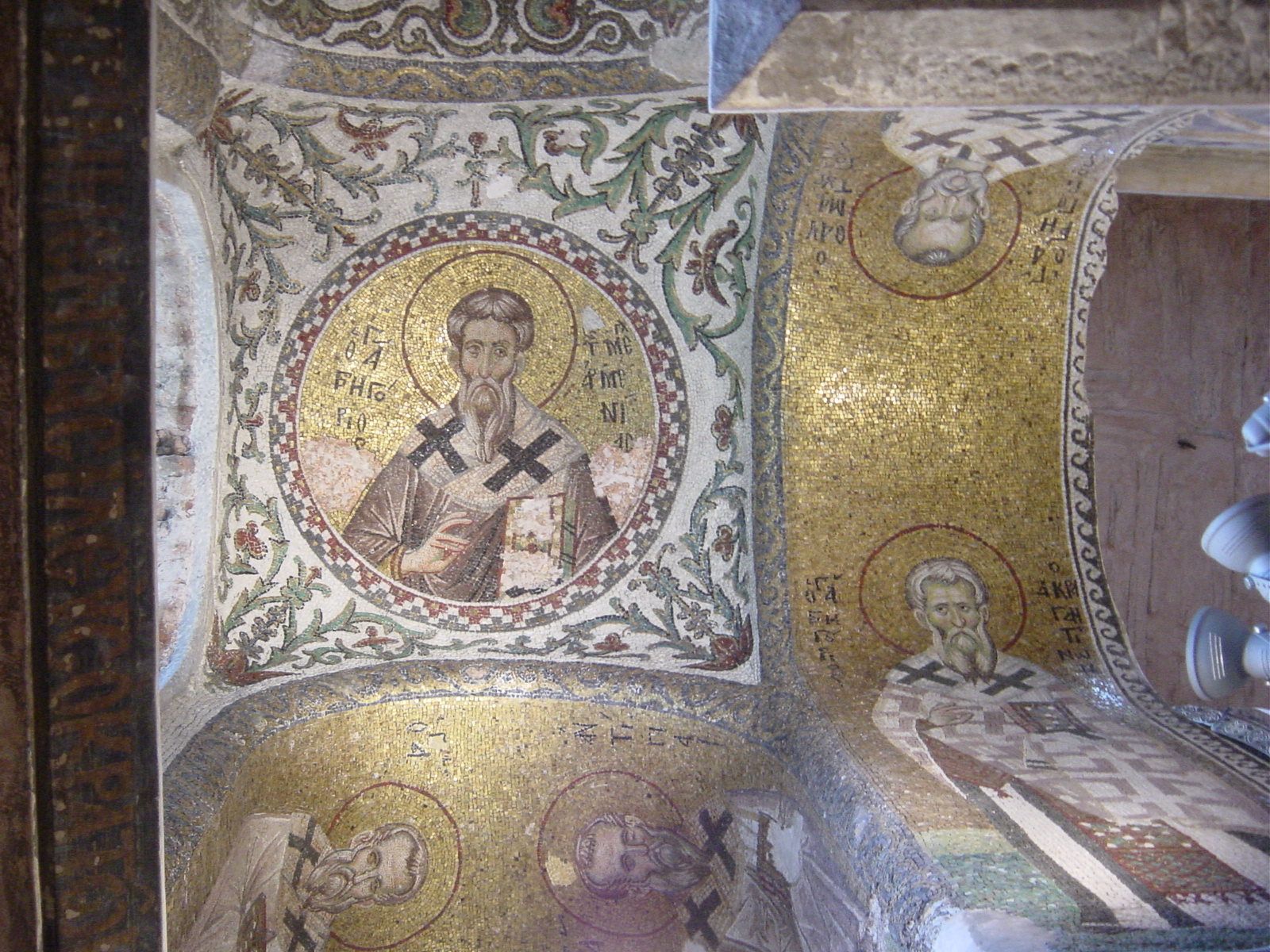 Istanbul: Museo dell'ex chiesa del Pammacaristos (Fetiye camii). Mosaici bizantini del XIV secolo rappresentanti figure di santi. Al centro, San Gregorio Armeno. Foto di: Giovanni Dall'Orto, 26-5-2006.